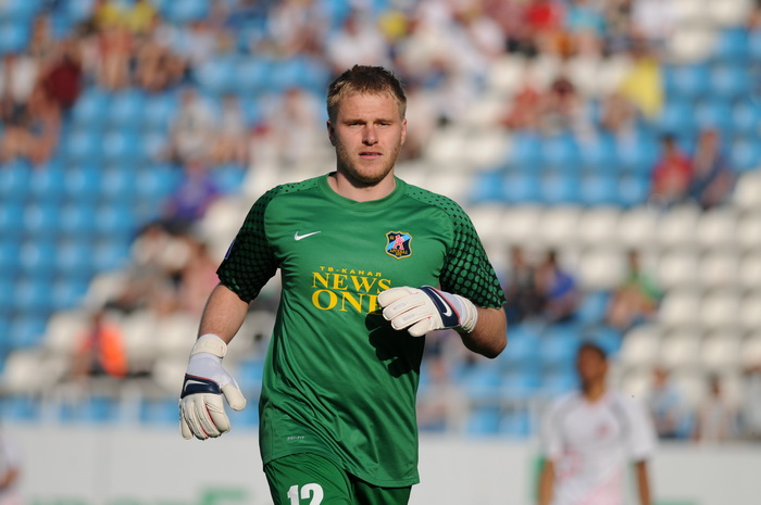 Yevhen Borovyk in 2012